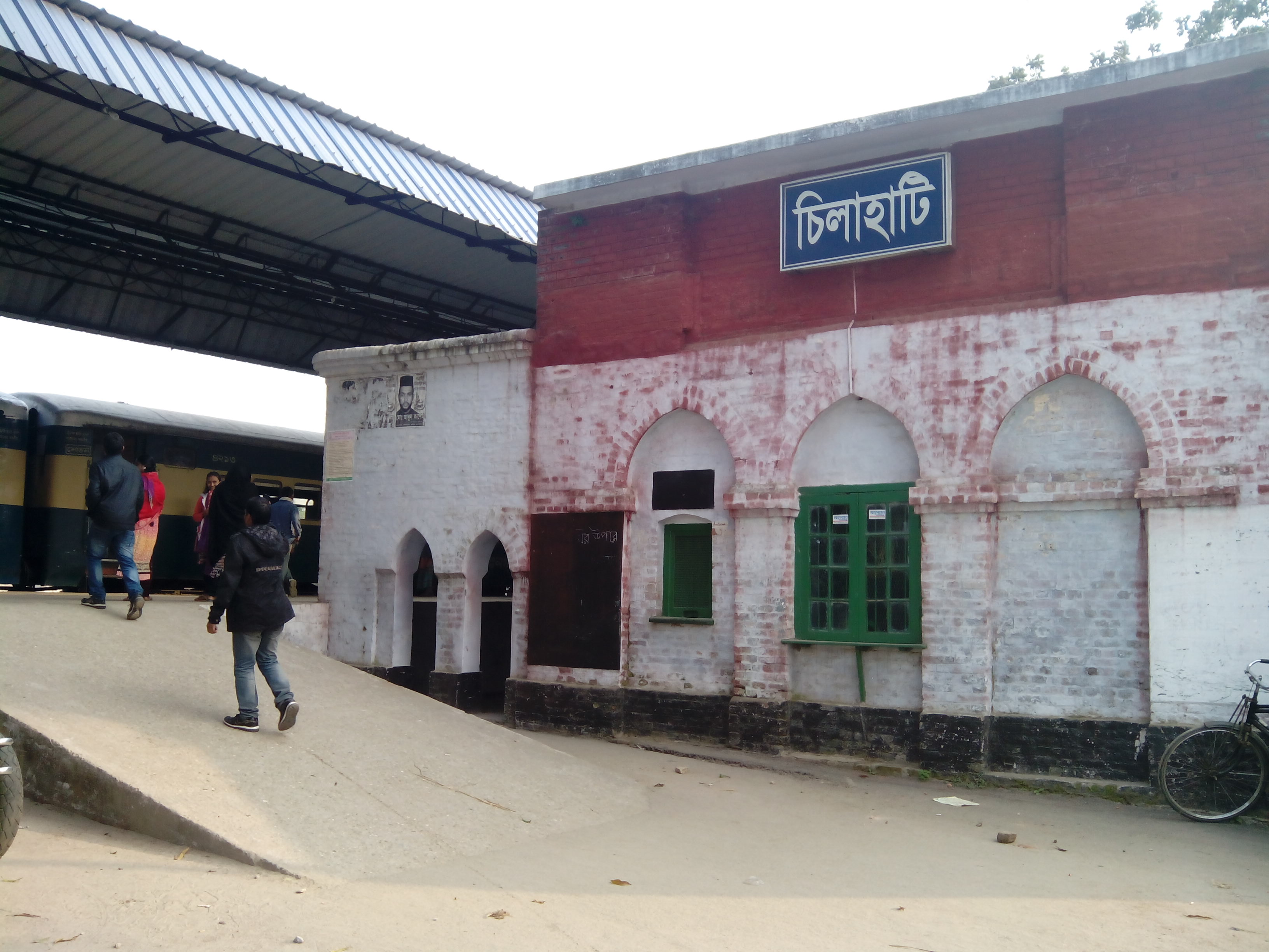 চিলাহাটি রেলওয়ে স্টেশন